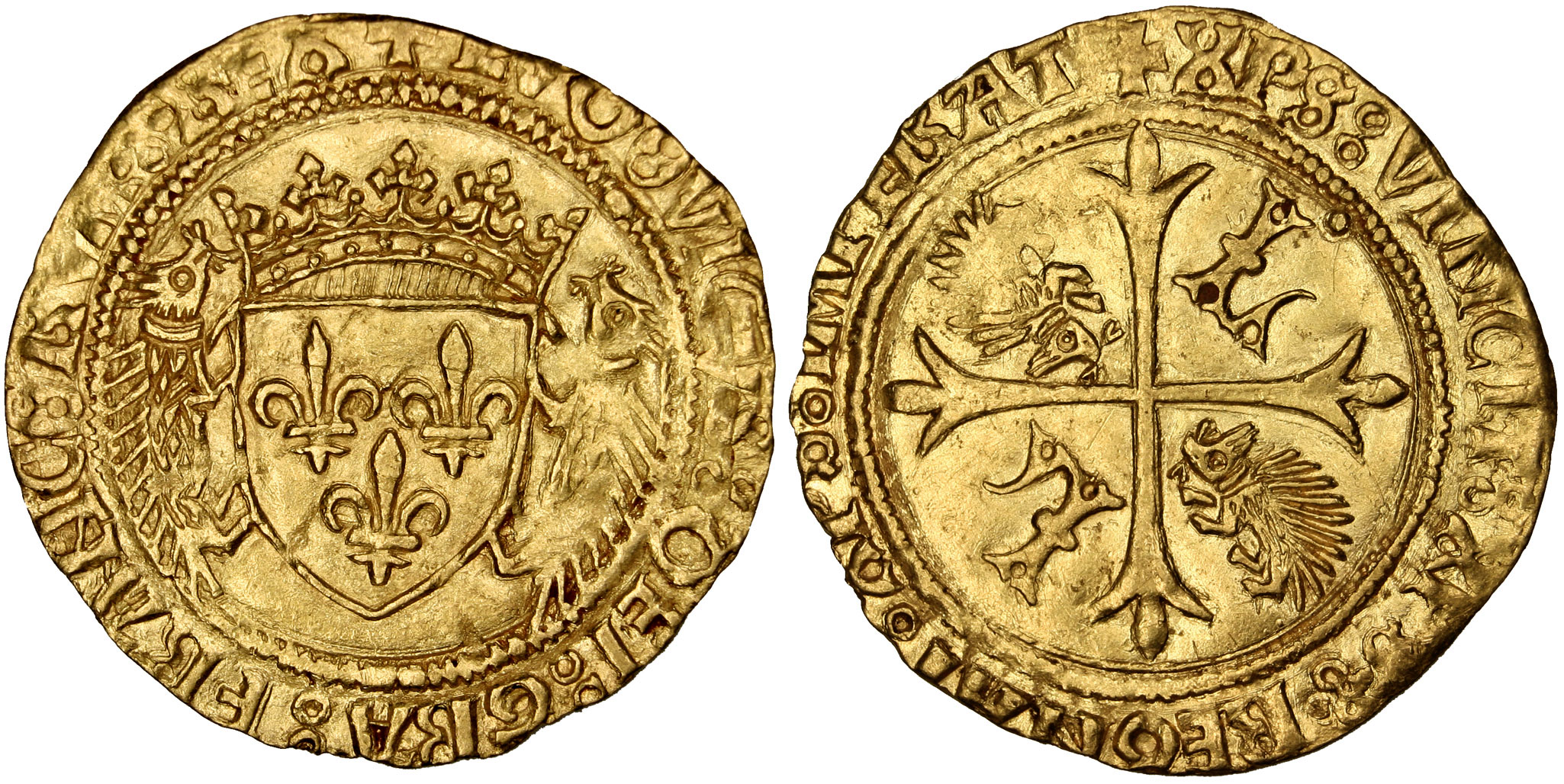 Louis XII (1498-1515), Écu d'or aux porcs-épics, Montpellier